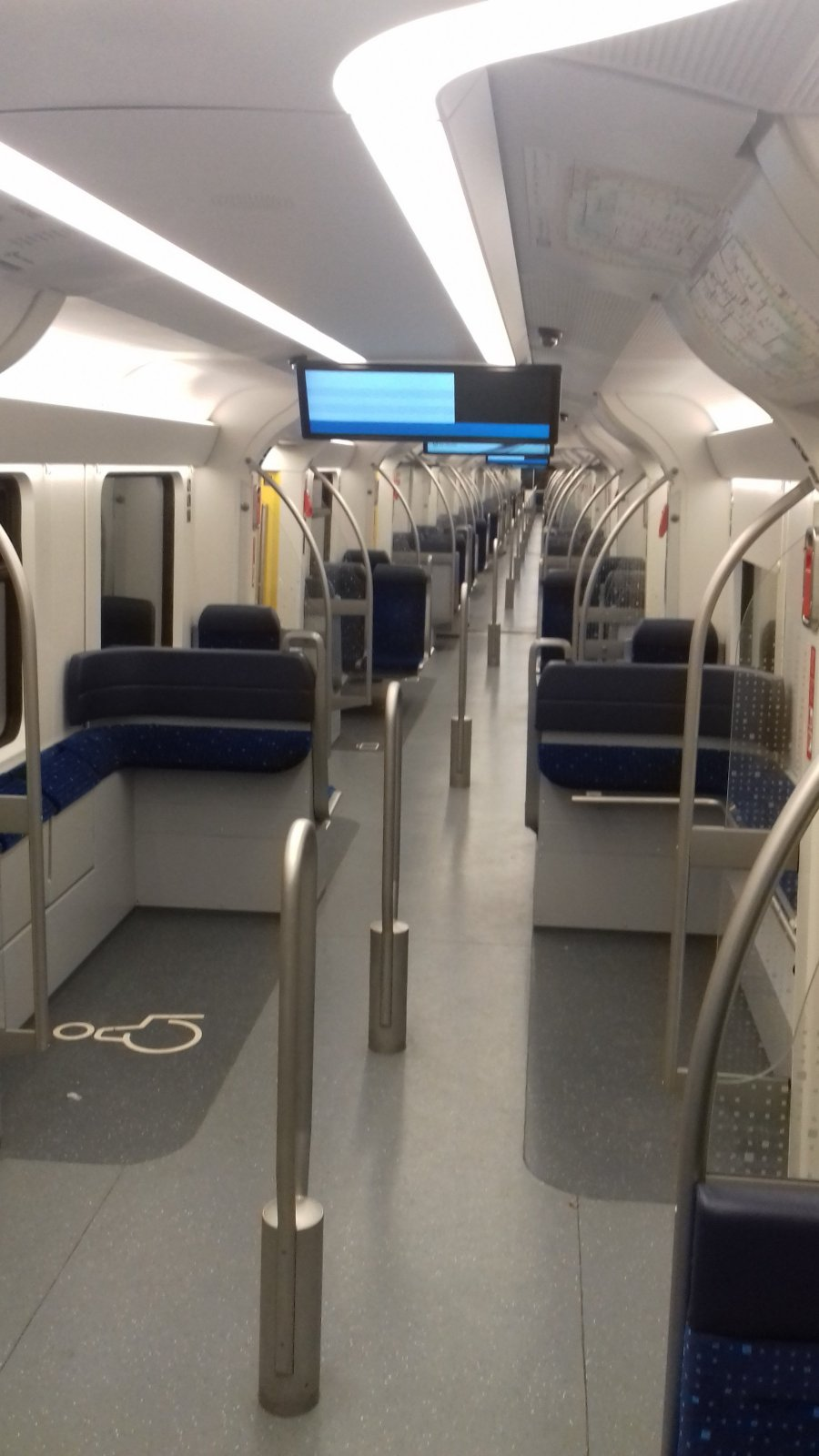 Innenansicht eines modernisierten Zuges der Baureihe 423 in München. Sehr gut zu sehen sind die modernen Fahrgastinformationsbildschirme, die Haltepilze sowie die rundum erneuerten Sitze.